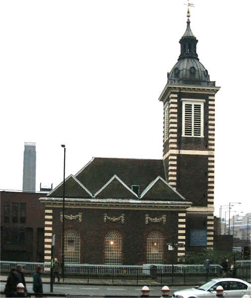 St Benet Paul's Wharf.